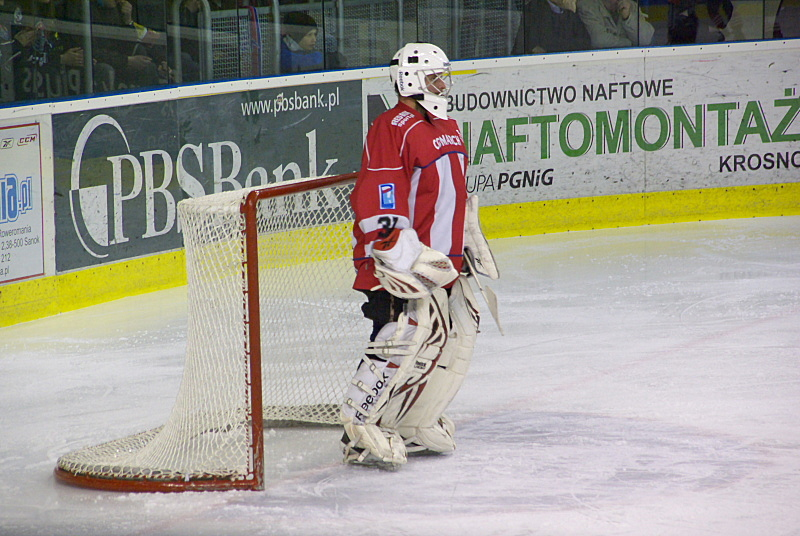 Rafał Radziszewski w barwach ComArch Cracovii podczas pierwszego meczu finałowego o Mistrzostwo Polski 2011/2012 z Ciarko PBS Bank Sanok (Arena Sanok, 7 marca 2012)